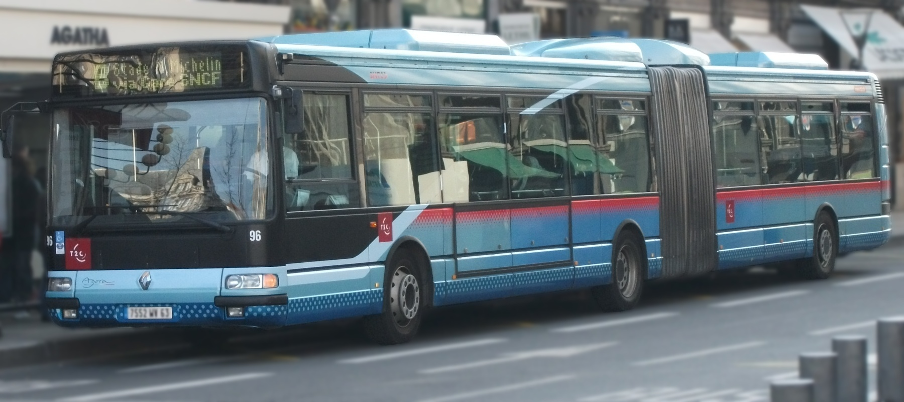 Renault Agora L sur la ligne B en direction de Stade Marcel-Michelin via Gare SNCF, Clermont-Ferrand, Puy-de-Dôme, France. Réseau T2C, arrêt Jaude